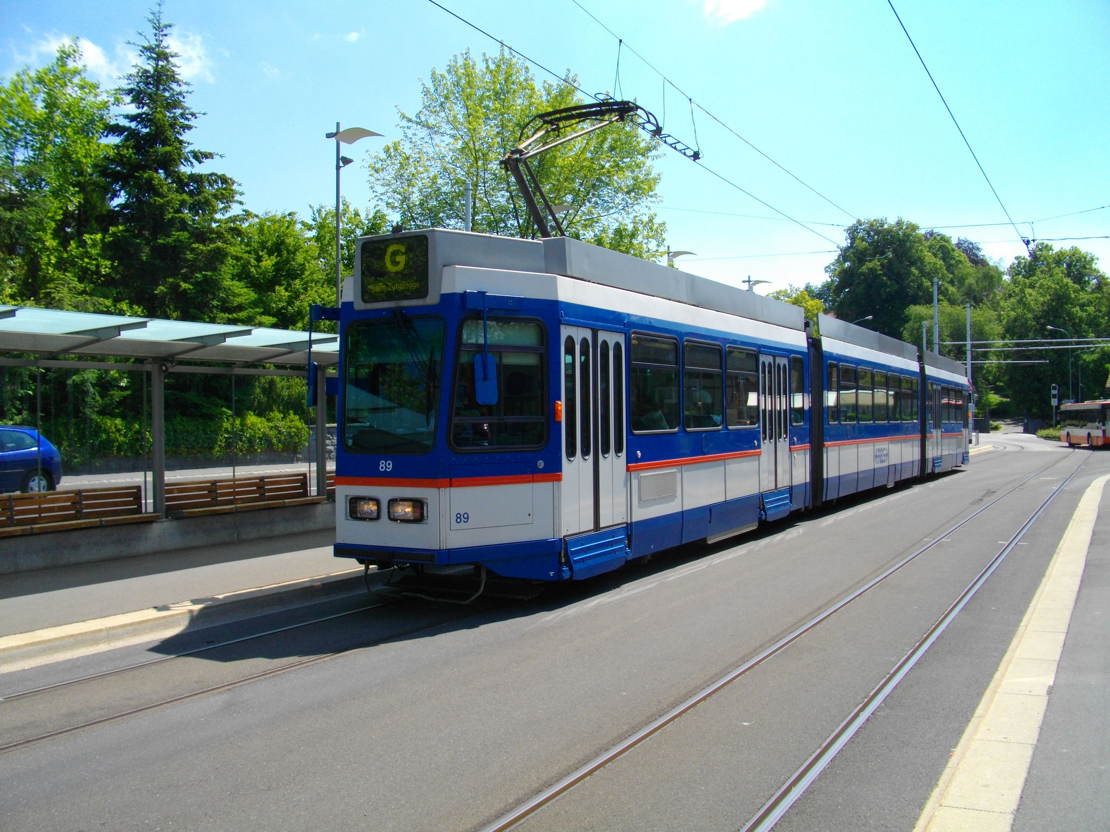 Tram en la estación de Muri